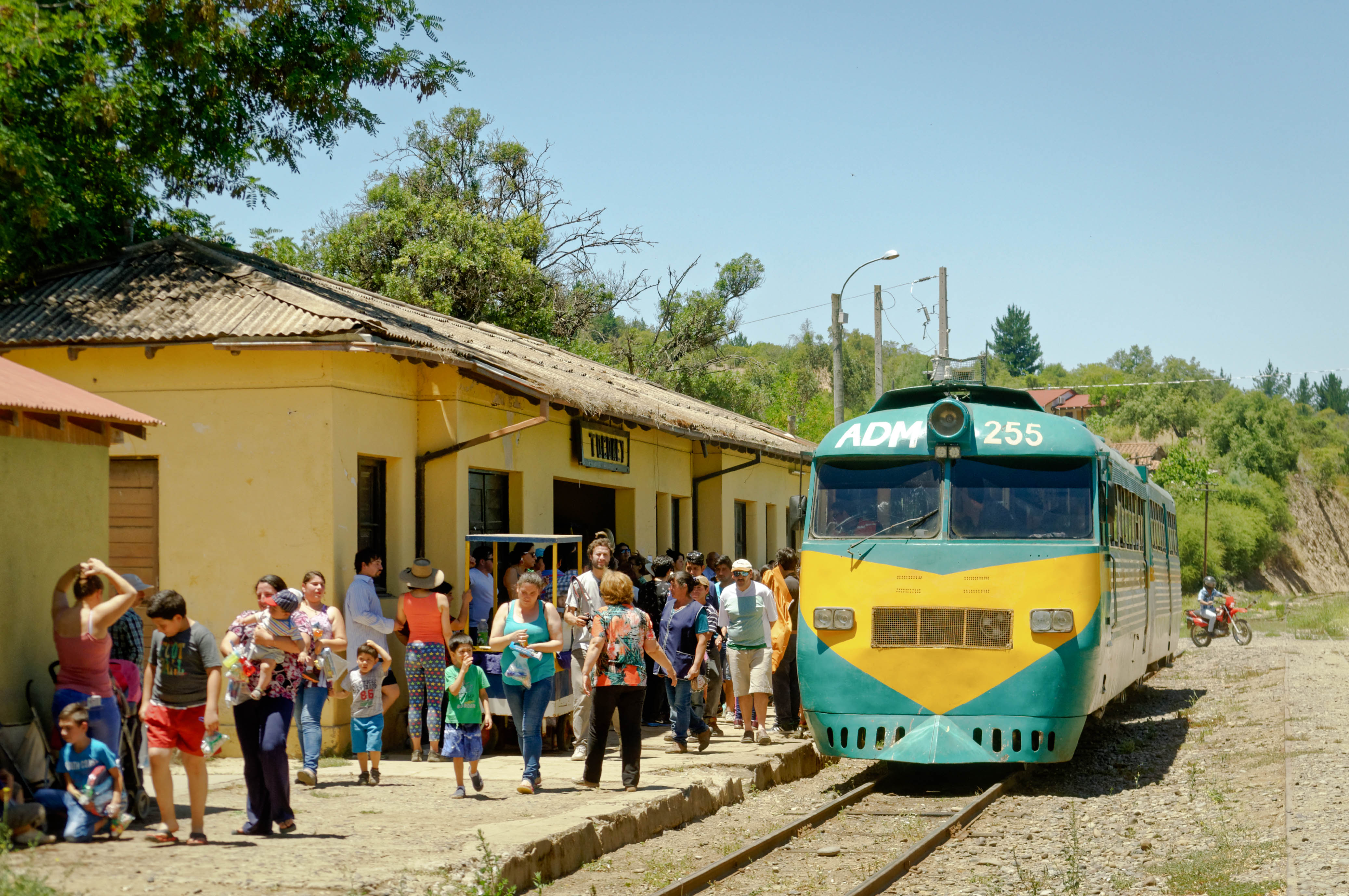 Literalmente, todo Toconey en la estacion, esperando al Viejito Pascuero, mientras los que reporteabamos, disfrutábamos de un buen mote con huesillos heladisimo y retratabamos al tren. Toconey, Diciembre 2016